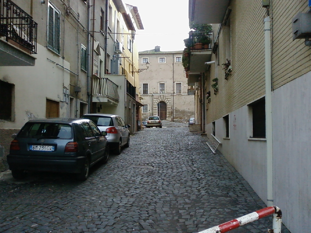 La facciata di Palazzo Caetani vista da un vicolo di Cisterna Vecchia